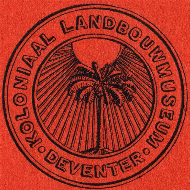 Beeldmerk voormalig Koloniaalmuseum Brinkgreverweg Deventer